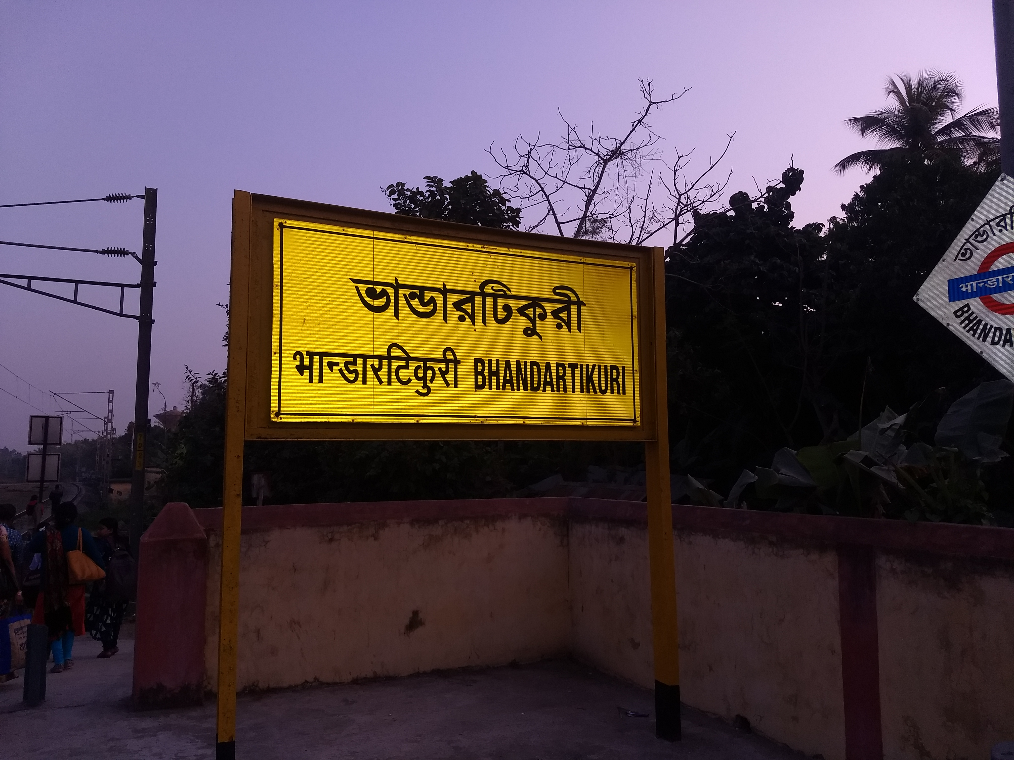 Bhandartikuri railway station